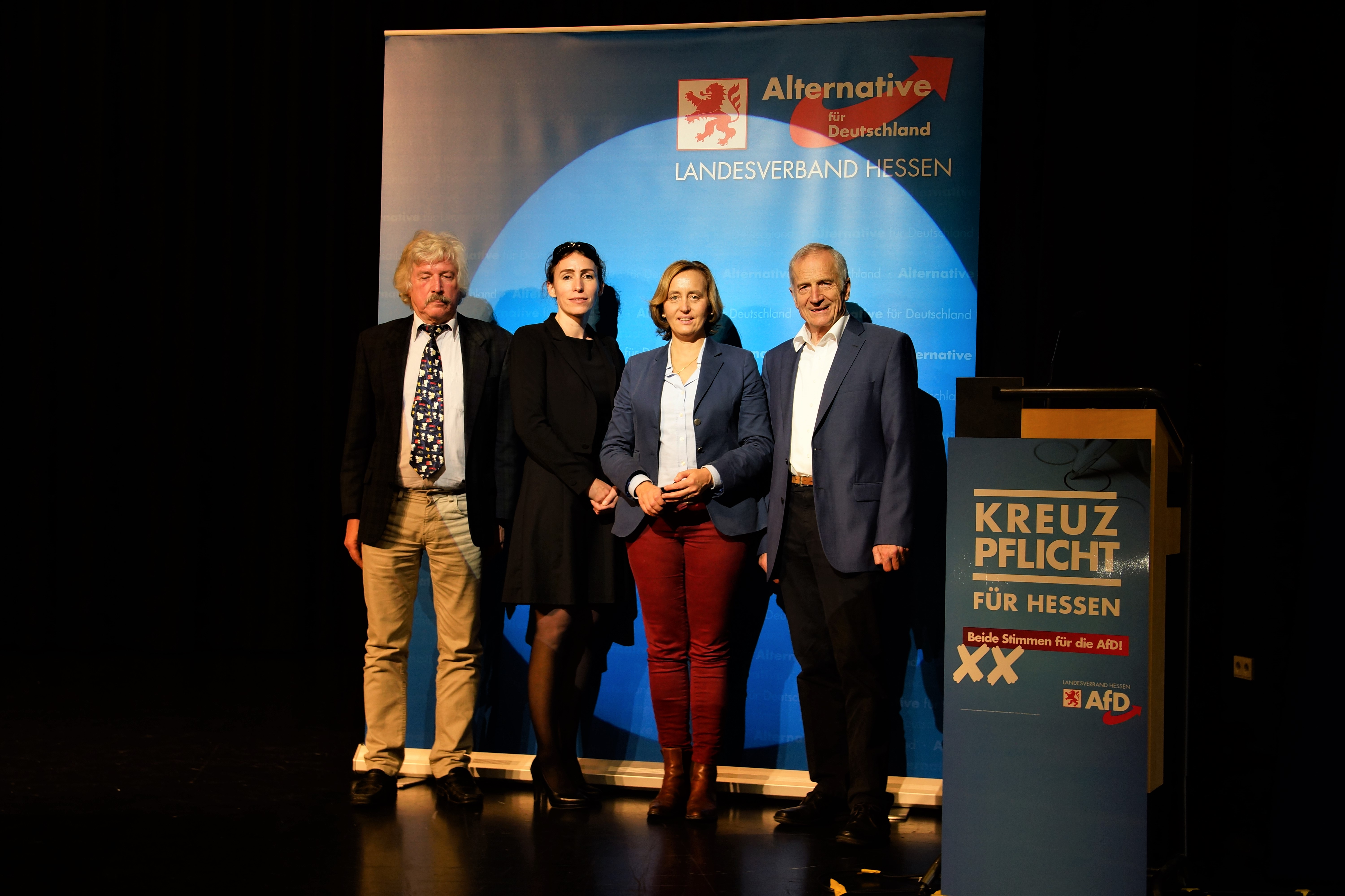 sh. Dateiname